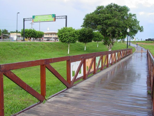 Bujari - Ac, Entrada